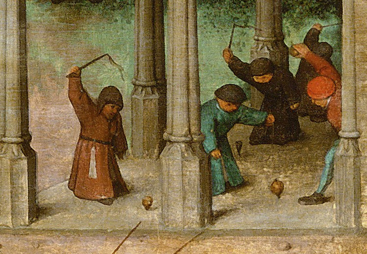 „Verschiedene Kreisel“ in Pieter Bruegels Gemälde Die Kinderspiele[1]